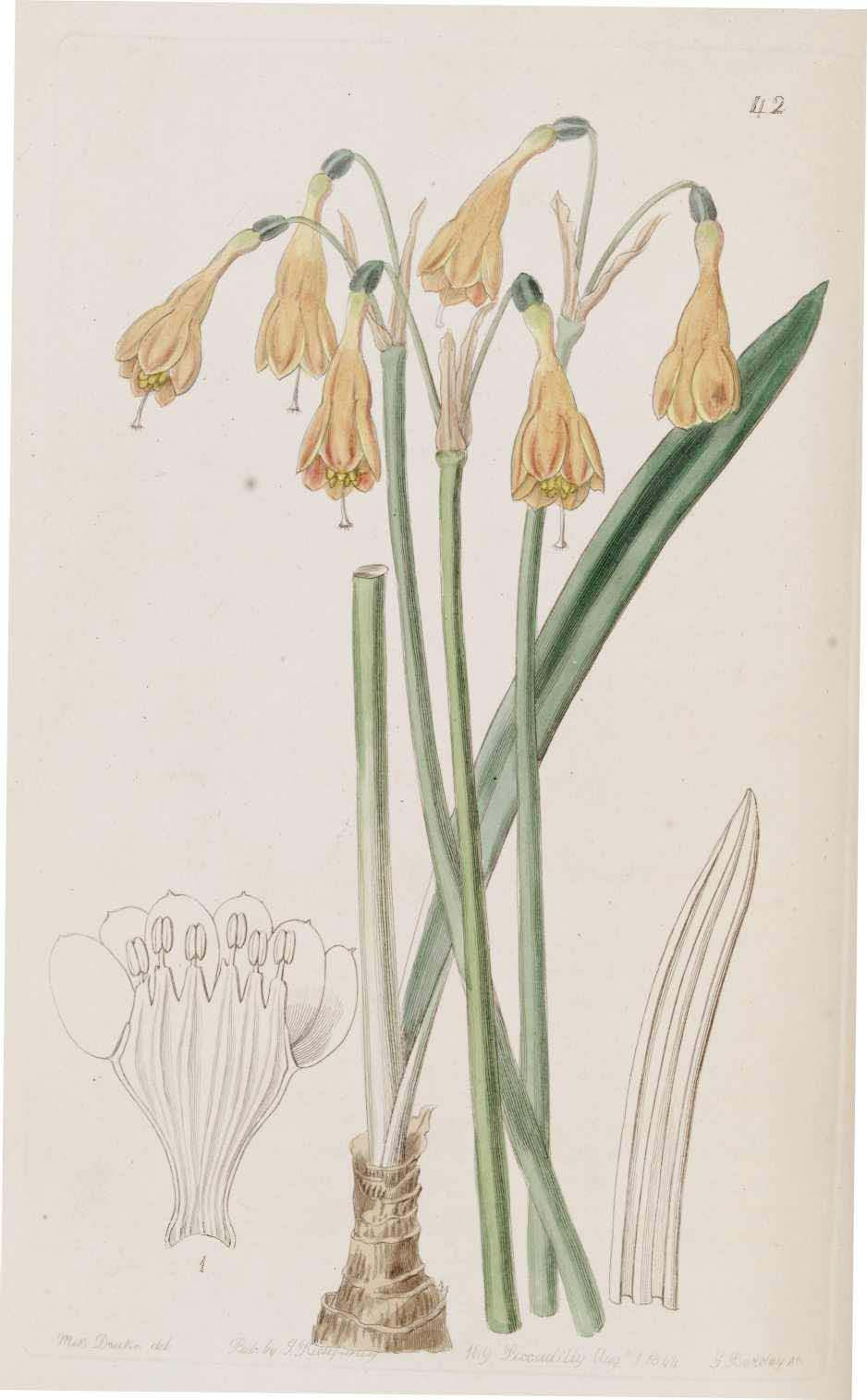 Stenomesson aurantiacum